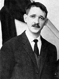 Svenolov Ehrén